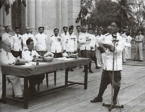 ລາວ: ນາຍົກລັດຖະມົນຕີ ທ່ານຜຸຍ ຊະນະນິກອນ ອ່ານຄຳປາໄສ ເນື່ອງໃນໂອກາດການໂອນອຳນາດ ຈາກຝຣັ່ງເສດໃຫ້ແກ່ຣາດຊະອານາຈັກລາວ ໃນວັນທີ່ 13 ເດືອນເມສາ ປີ 1950.